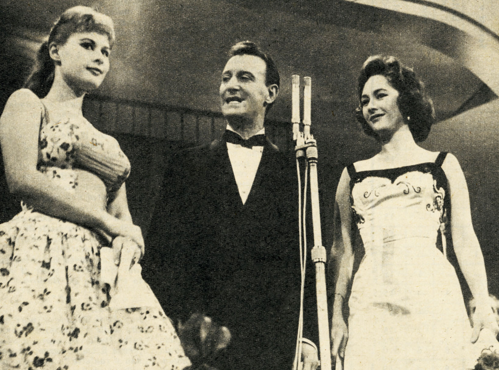 Marisa Allasio, Nunzio Filogamo and Fiorella Mari presenting the 1957 Sanremo Music Festival